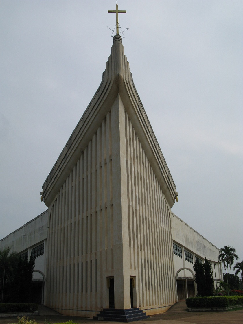 Ban Tharae